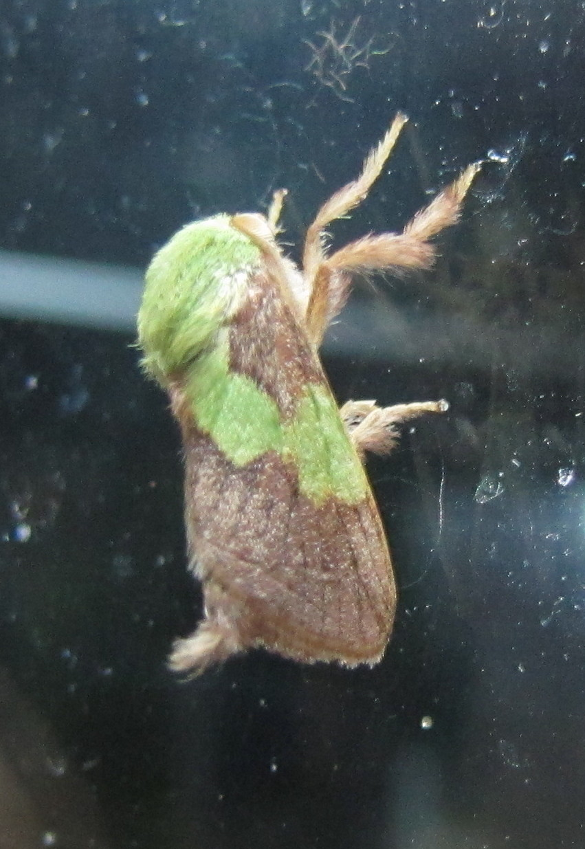 Latoia lepida or Parasa lepida (Cramer, 1799) Moth from Mangalore